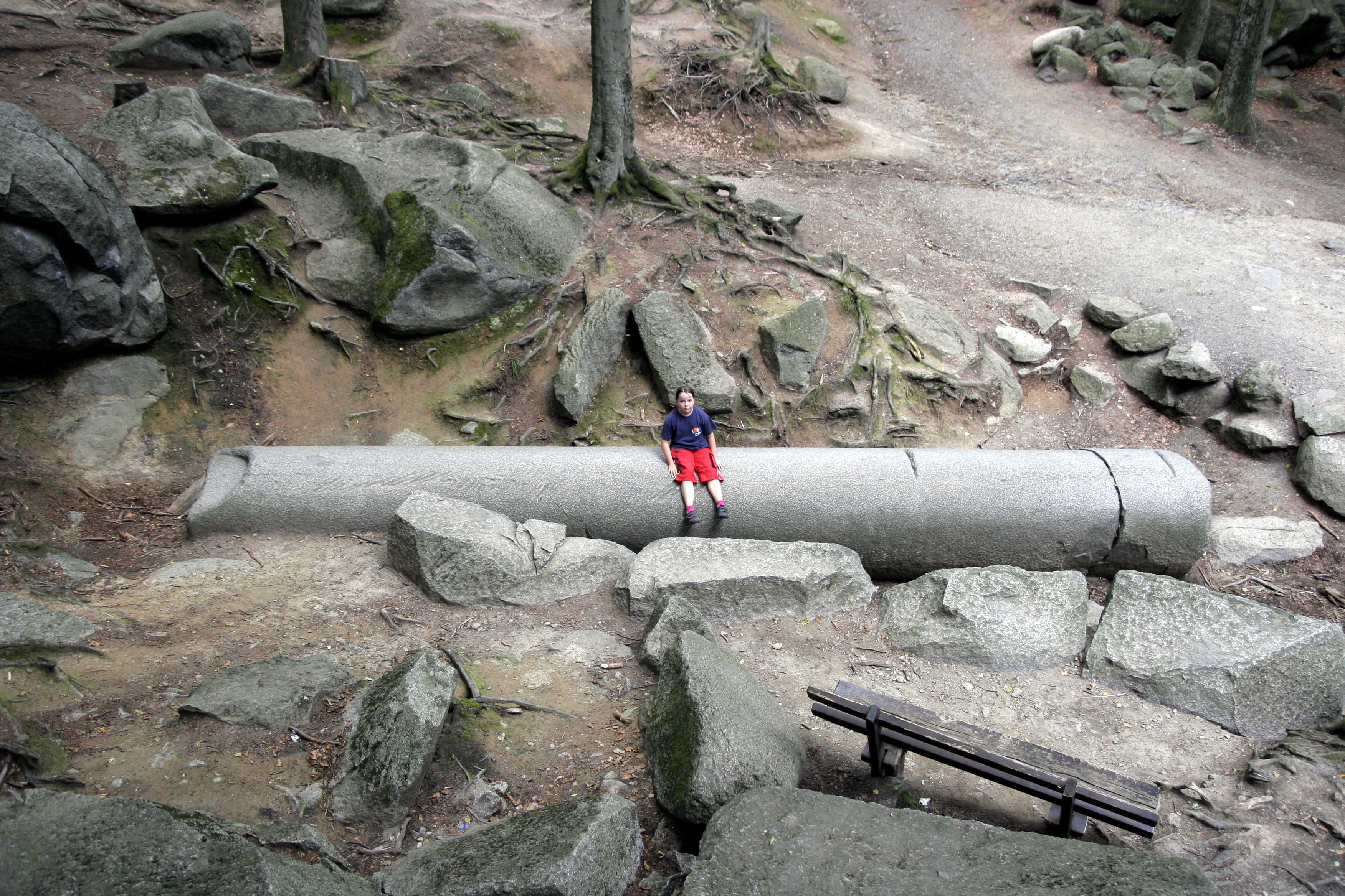 Die Riesensäule im Felsenmeer bei Lautertal (Odenwald) Ortsteil Reichenbach